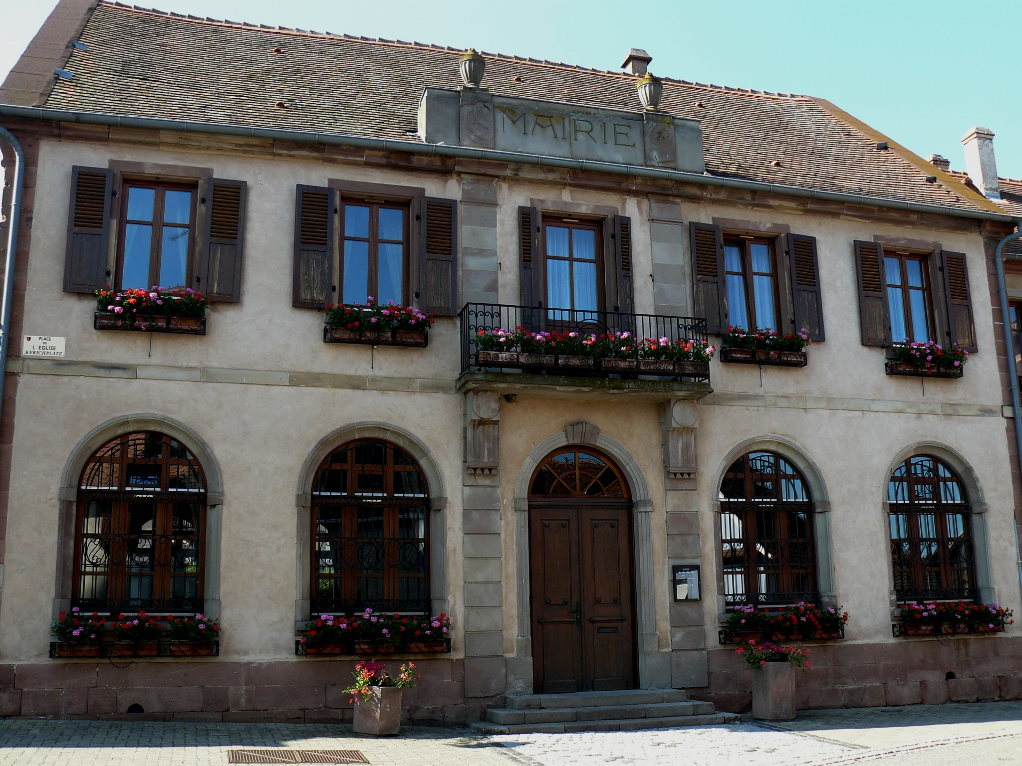 Mairie